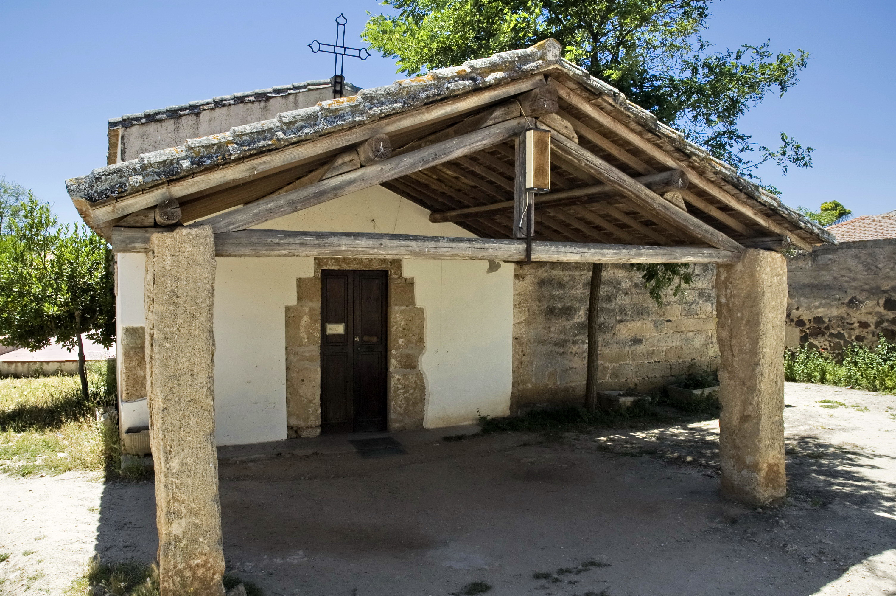 San Salvatore Tharros - MIBAC This is a photo of a monument which is part of cultural heritage of Italy.